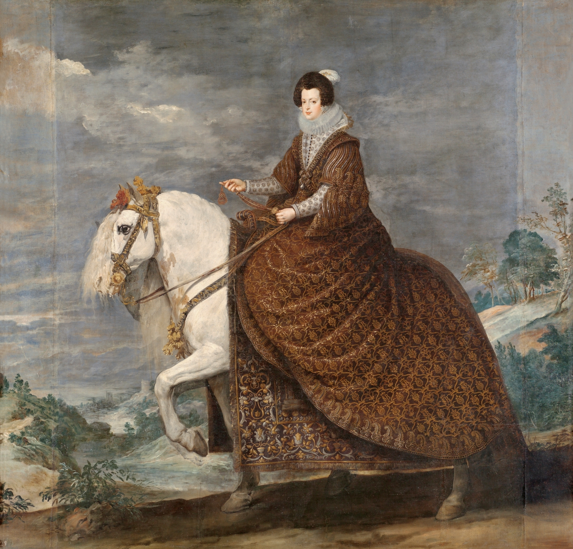 Retrato ecuestre de la reina Isabel de Borbón (1602-1644), que fue hija del rey Enrique IV de Francia y reina consorte de España por su matrimonio con el rey Felipe IV de España.